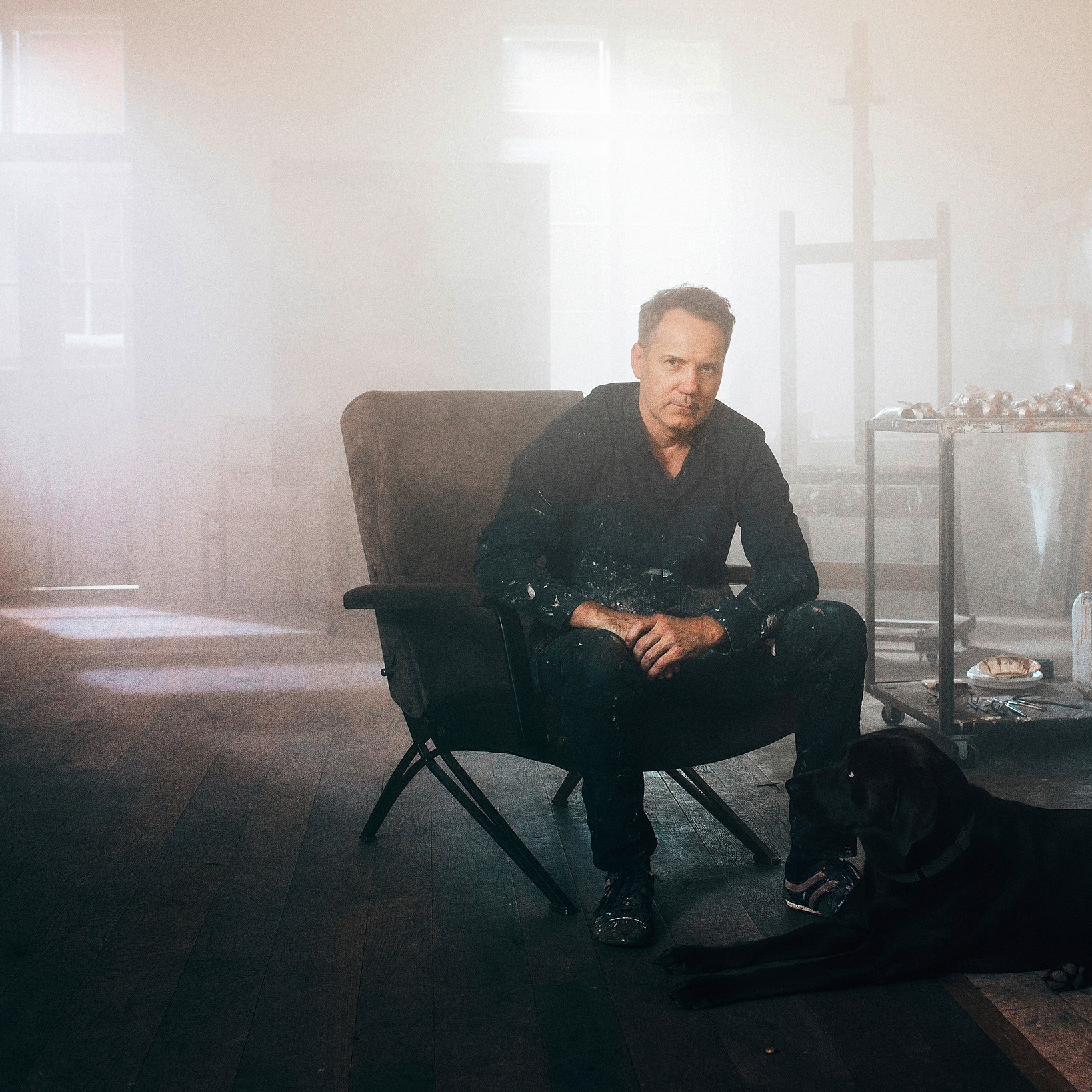 Andy Denzler dans son studio, portrait de Lukas Mäder 2019